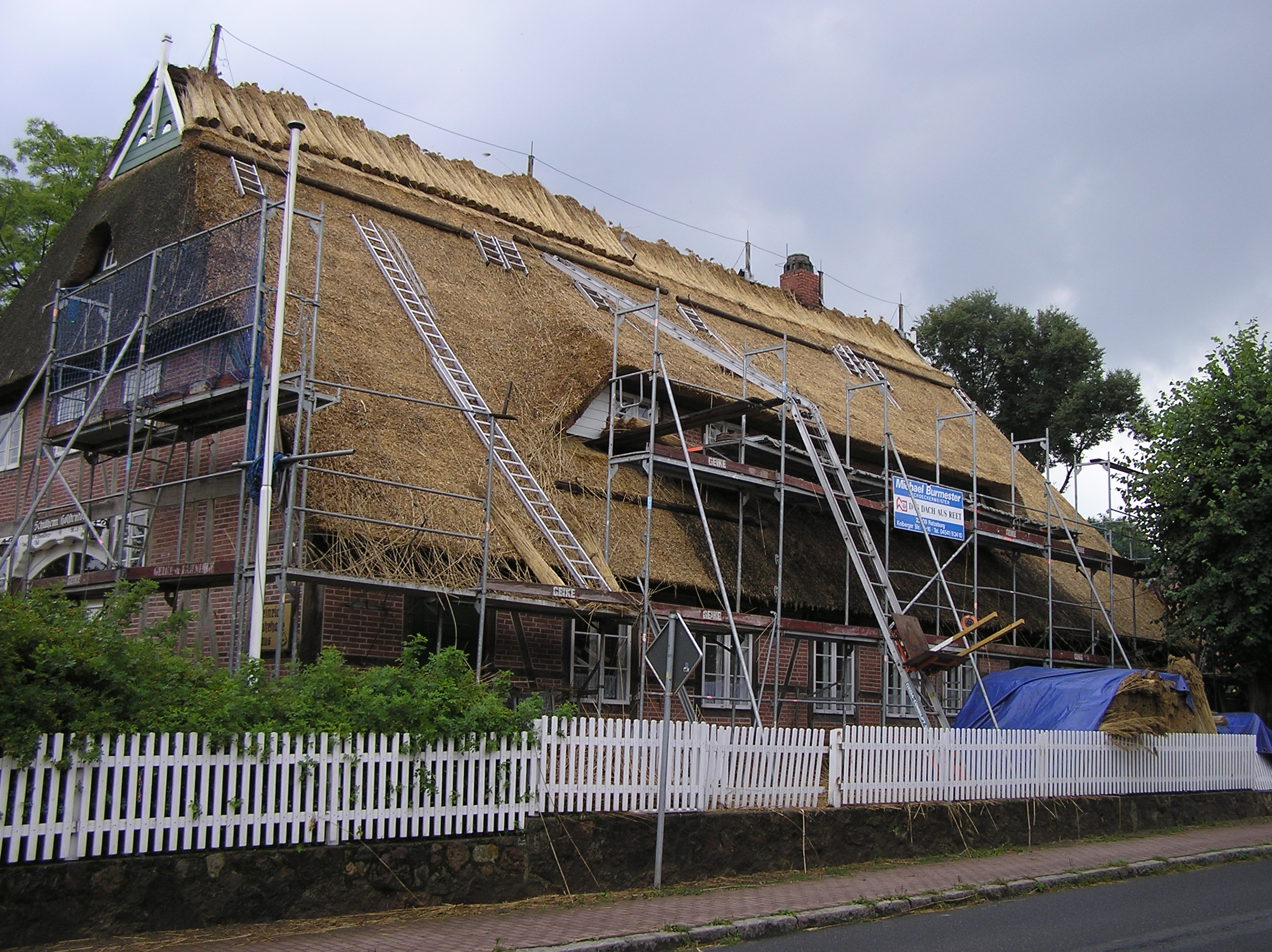 Schullandheim Holstentor in Hoisdorf "Heinrich-Sahrhager-Haus"